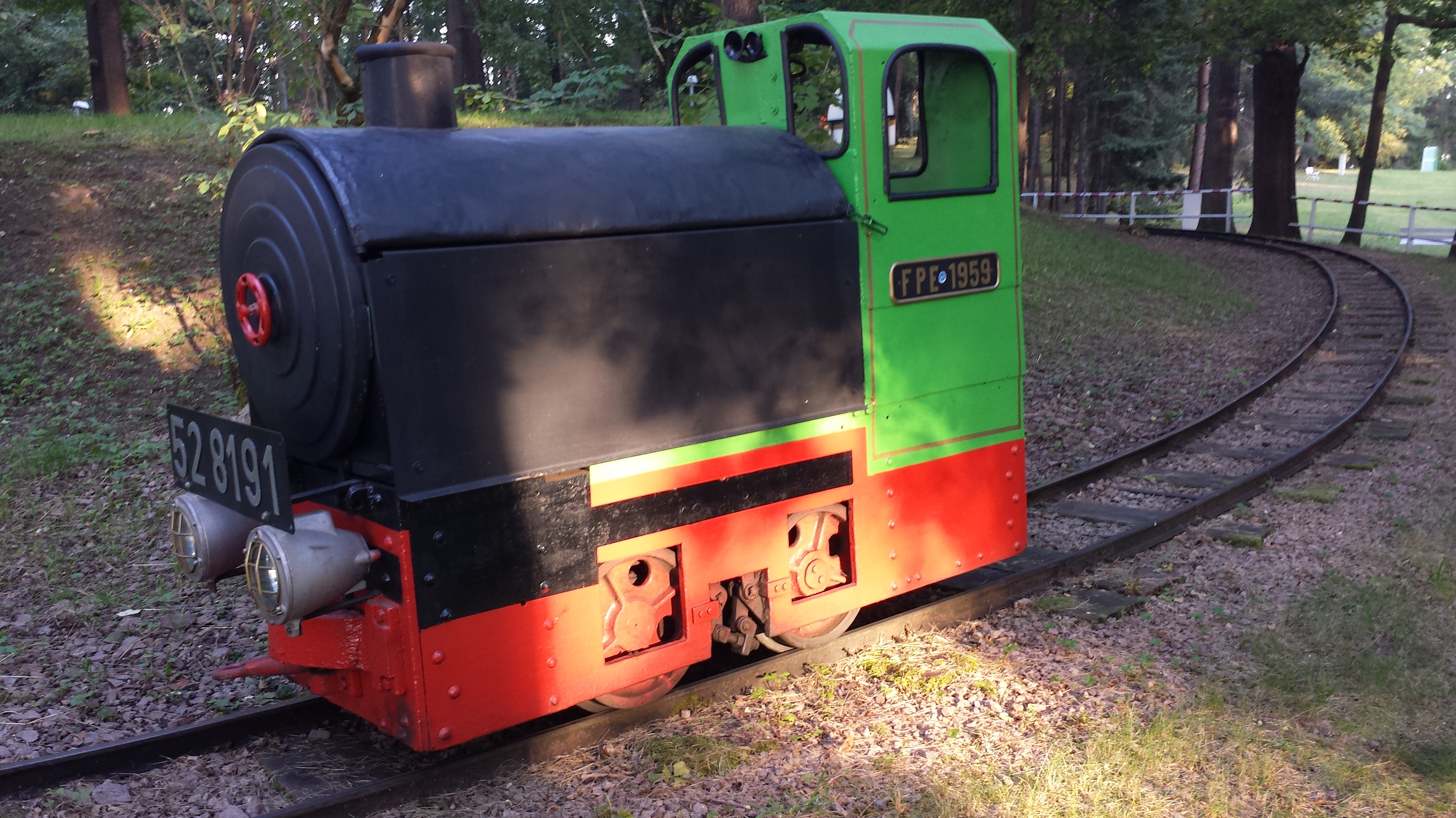 Akkulokomotive Parkeisenbahn Friedrichsgrün